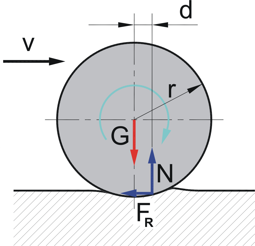 Magyarázó ábra a gördülő ellenálláshoz